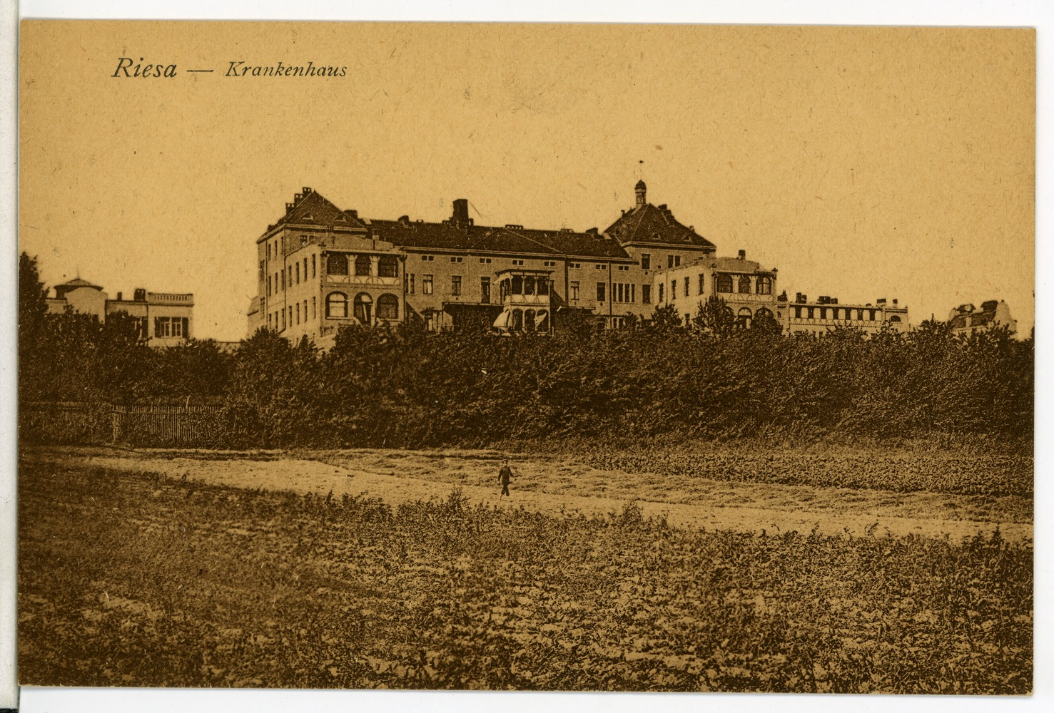 Riesa; Krankenhaus This postcard is from publisher Brück & Sohn in Meißen ( postcard has a unique number 09522 and is available in a higher resolution at the publisher. This images was uploaded in a cooperation project between Wikipedians and the publisher.